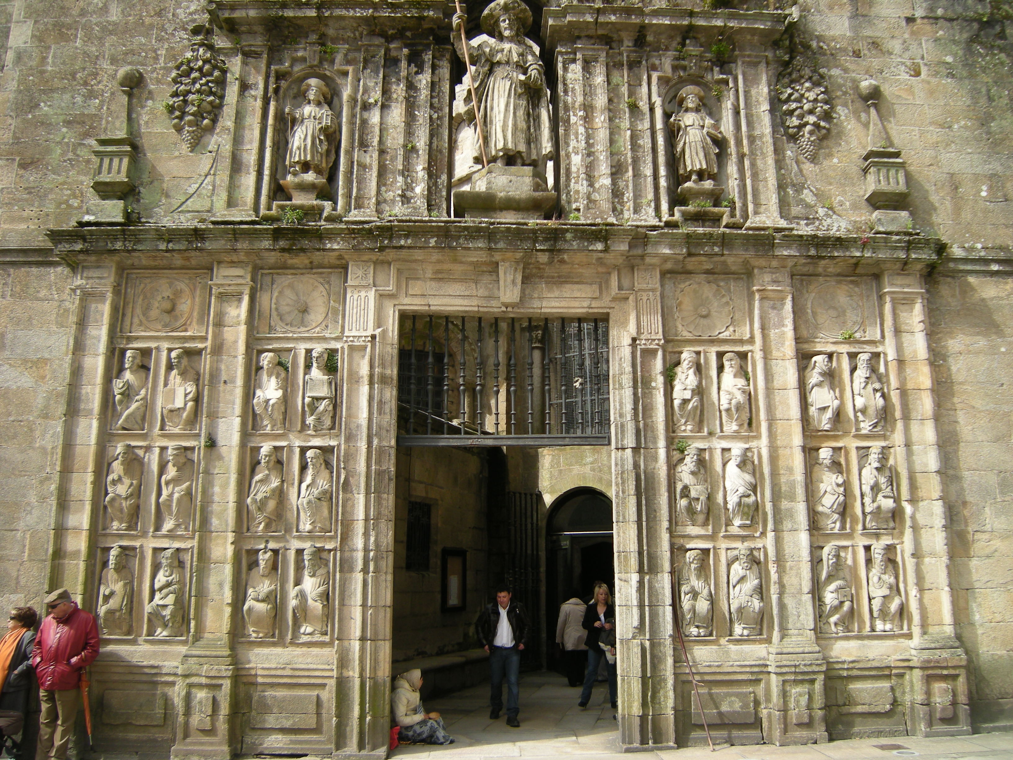 Porta Santa. Catedral de Santiago de Compostela